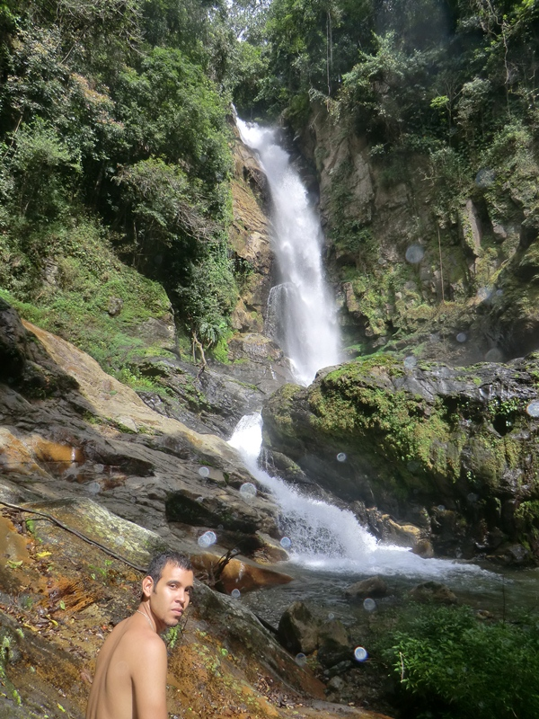 Cascada del Norte. La caida de agua más alta de la Cordillera de la Costa. Ubicada en Guatire. Venezuela